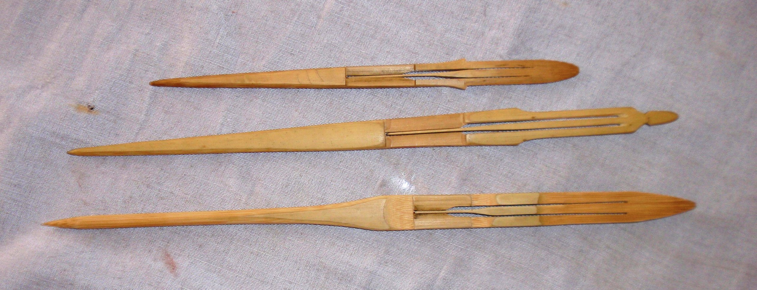 অসমীয়া: গগণা